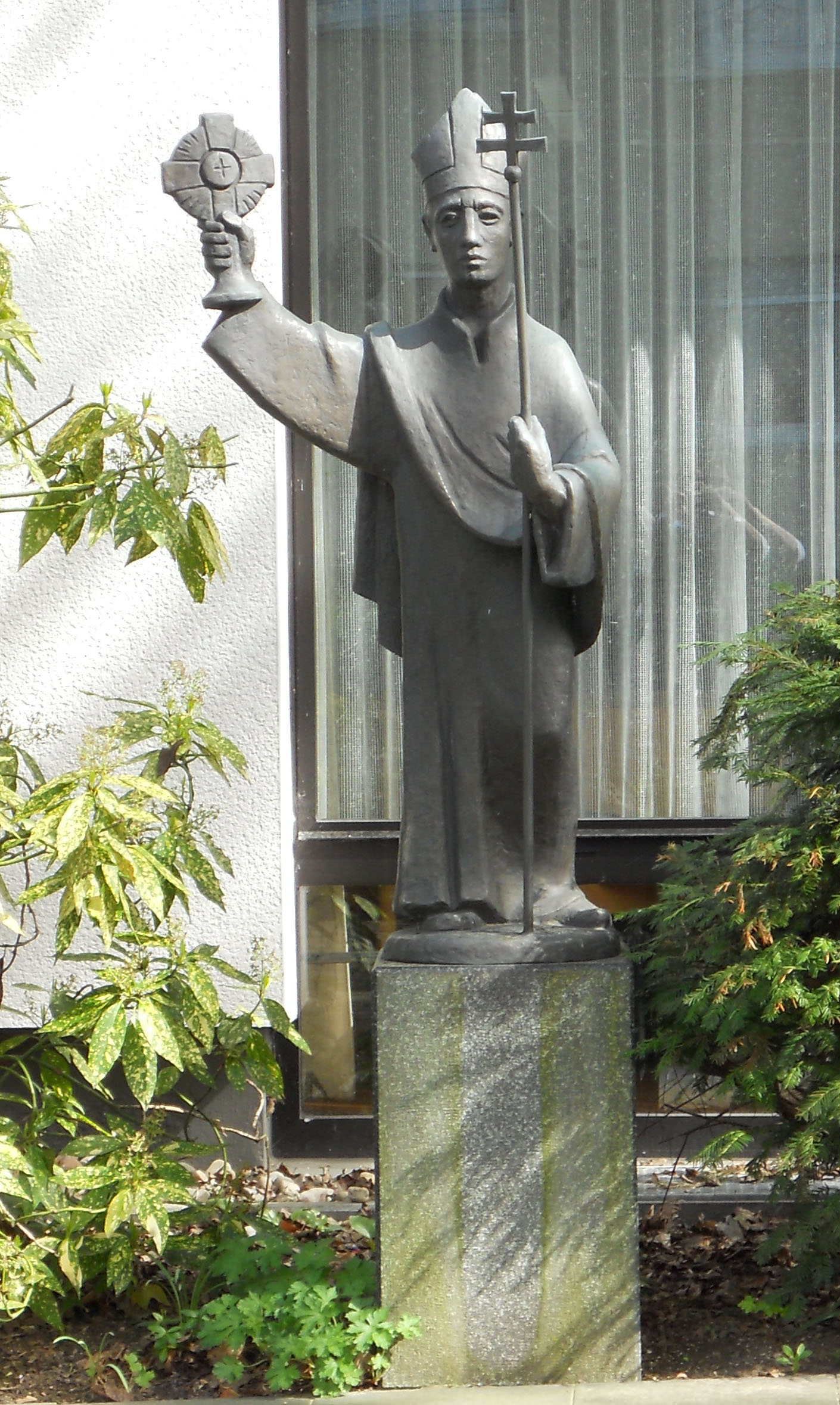 Bronzefigur des heiligen Norbert vor dem Gemeindehaus der St. Norbert Gemeinde, geschaffen von Wäscher